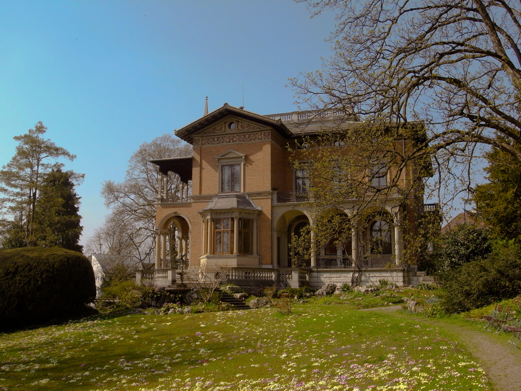 Villa Bleuler, Ansicht vom Garten